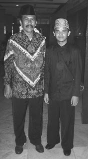 Sultan kepaksian belunguh, Pun beliau Suttan Pangeran Junjungan Sakti II